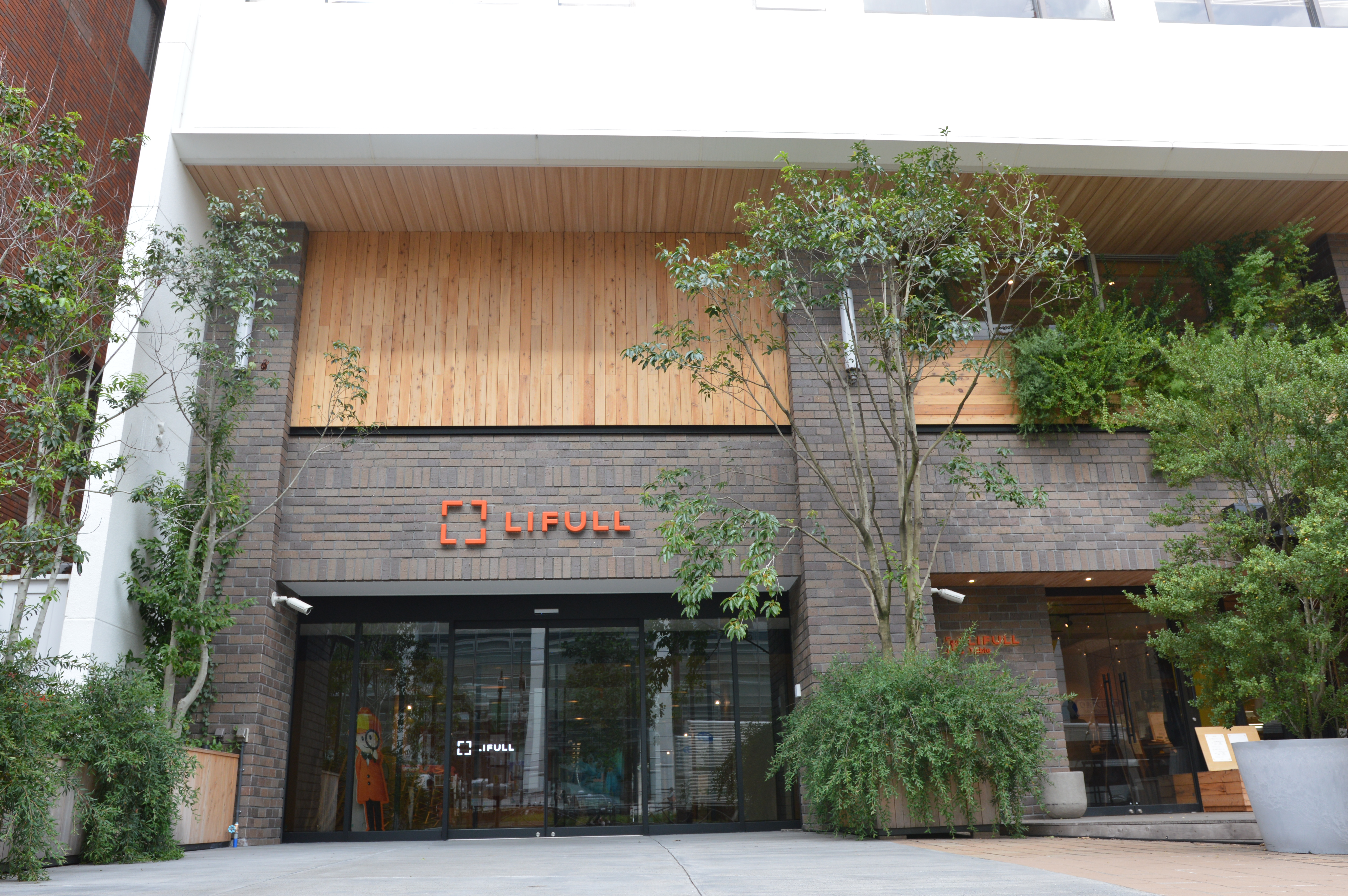 株式会社LIFULL本社（東京都麹町）